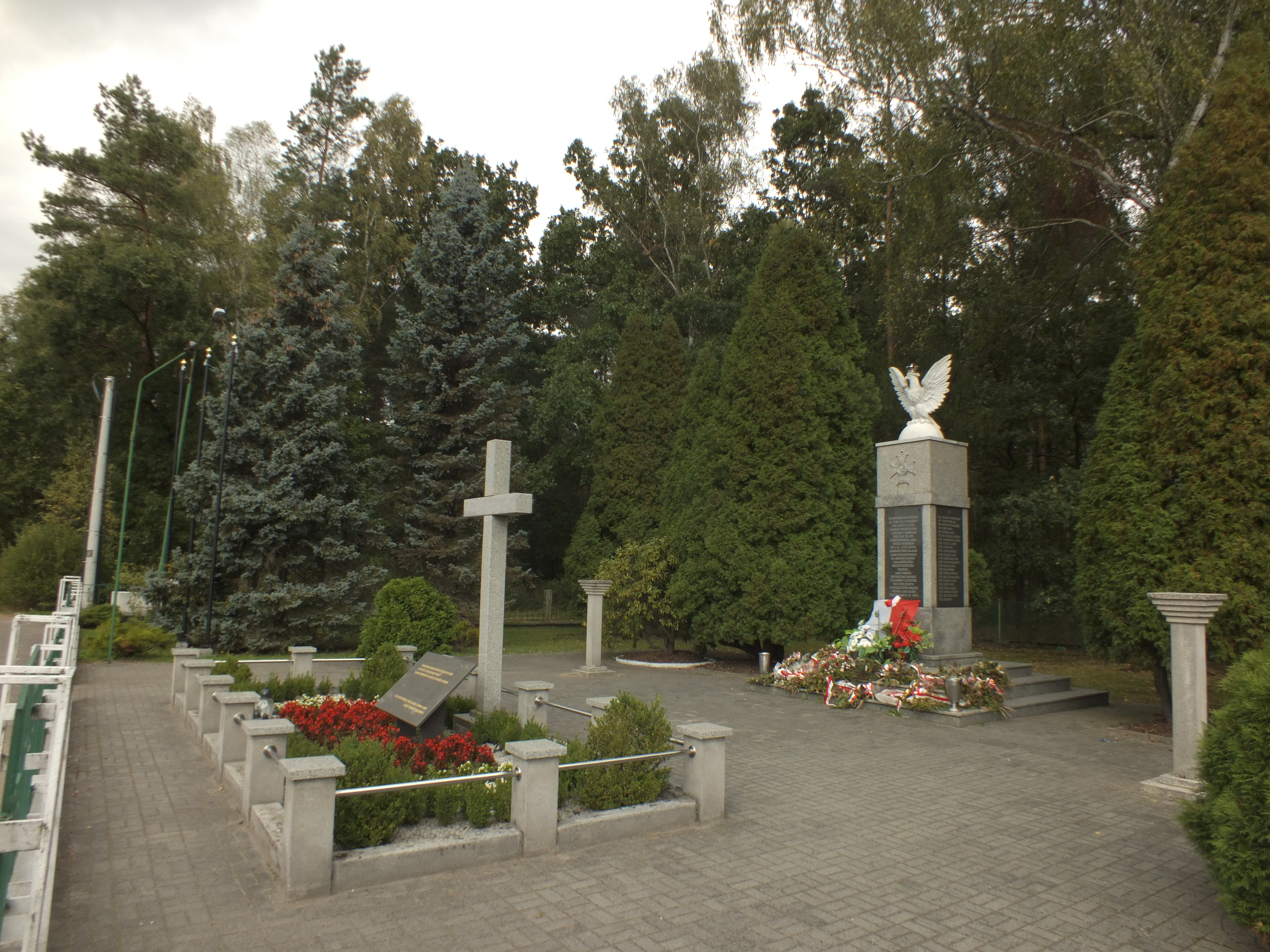 województwo śląskie powiat mikołowski Wyry Pomnik Pamięci Żołnierzy Września 1939 r